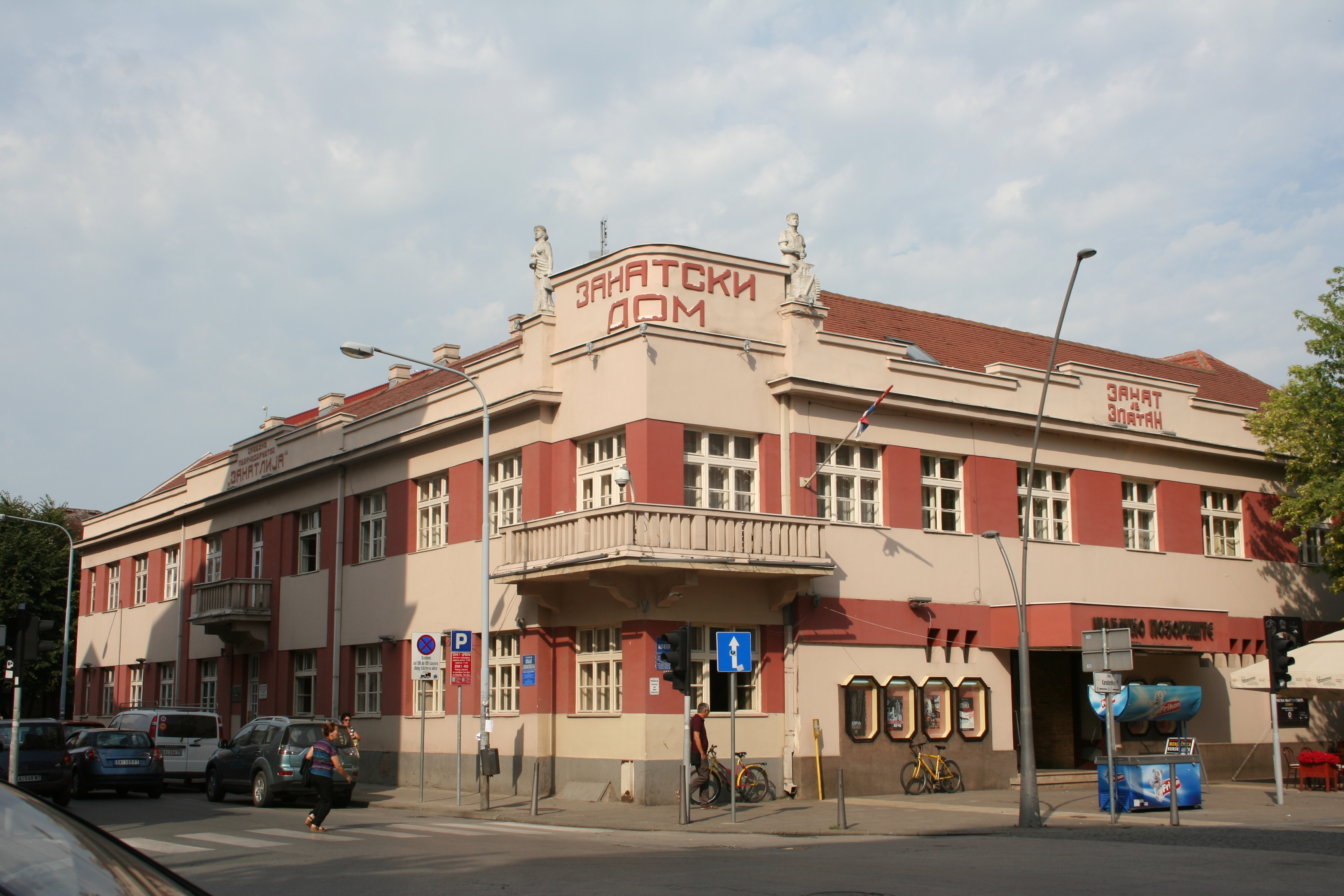 Zgrada pozorišta Šabac